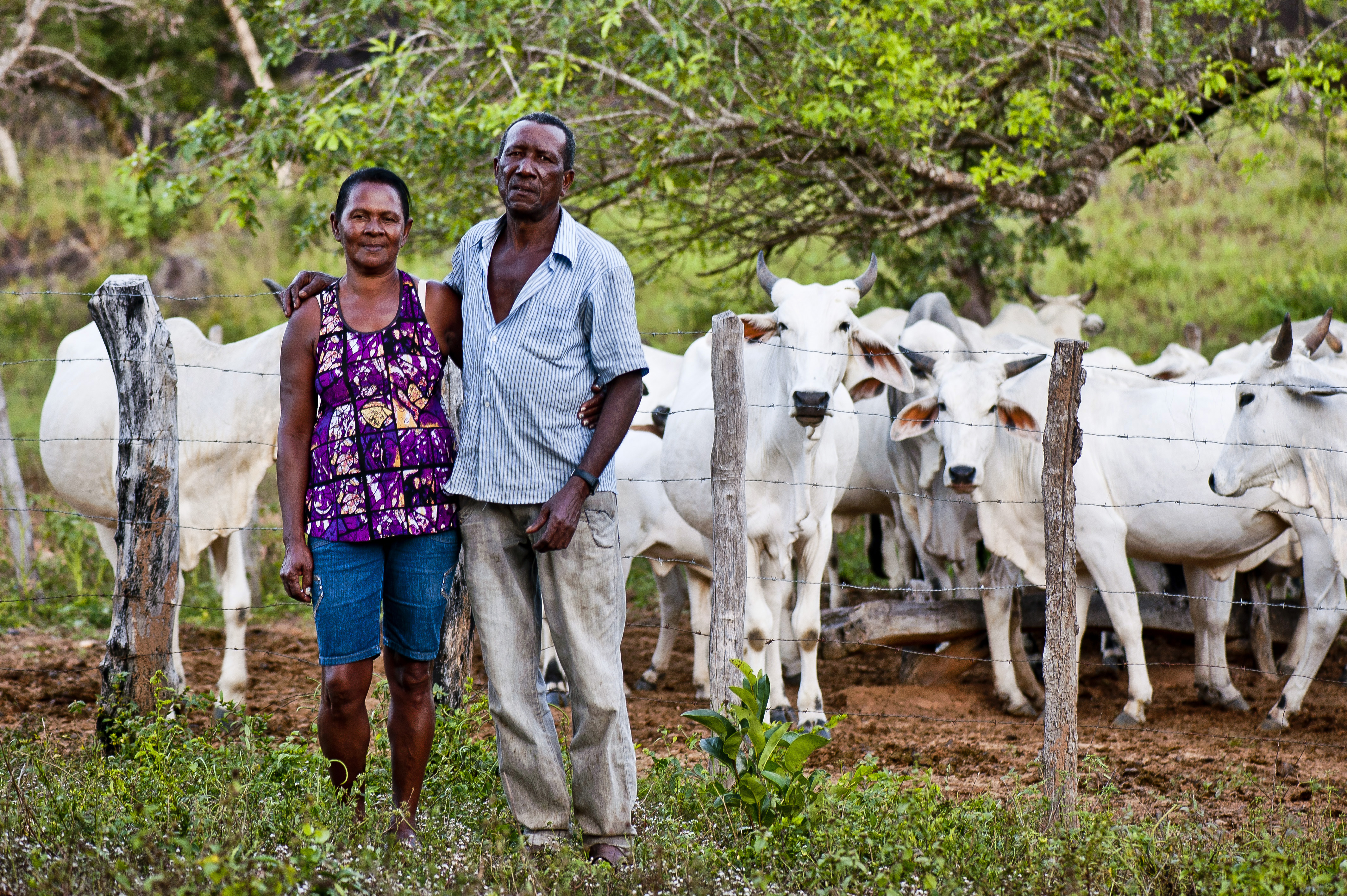 Terezinha de Goiás-GO, 13/05/2014. O casal kalunga Domingos da Cunha Fernandes e sua esposa Julia Rodrigues do Prado cria gado zebu nelore. Foto: Sergio Amaral/MDS